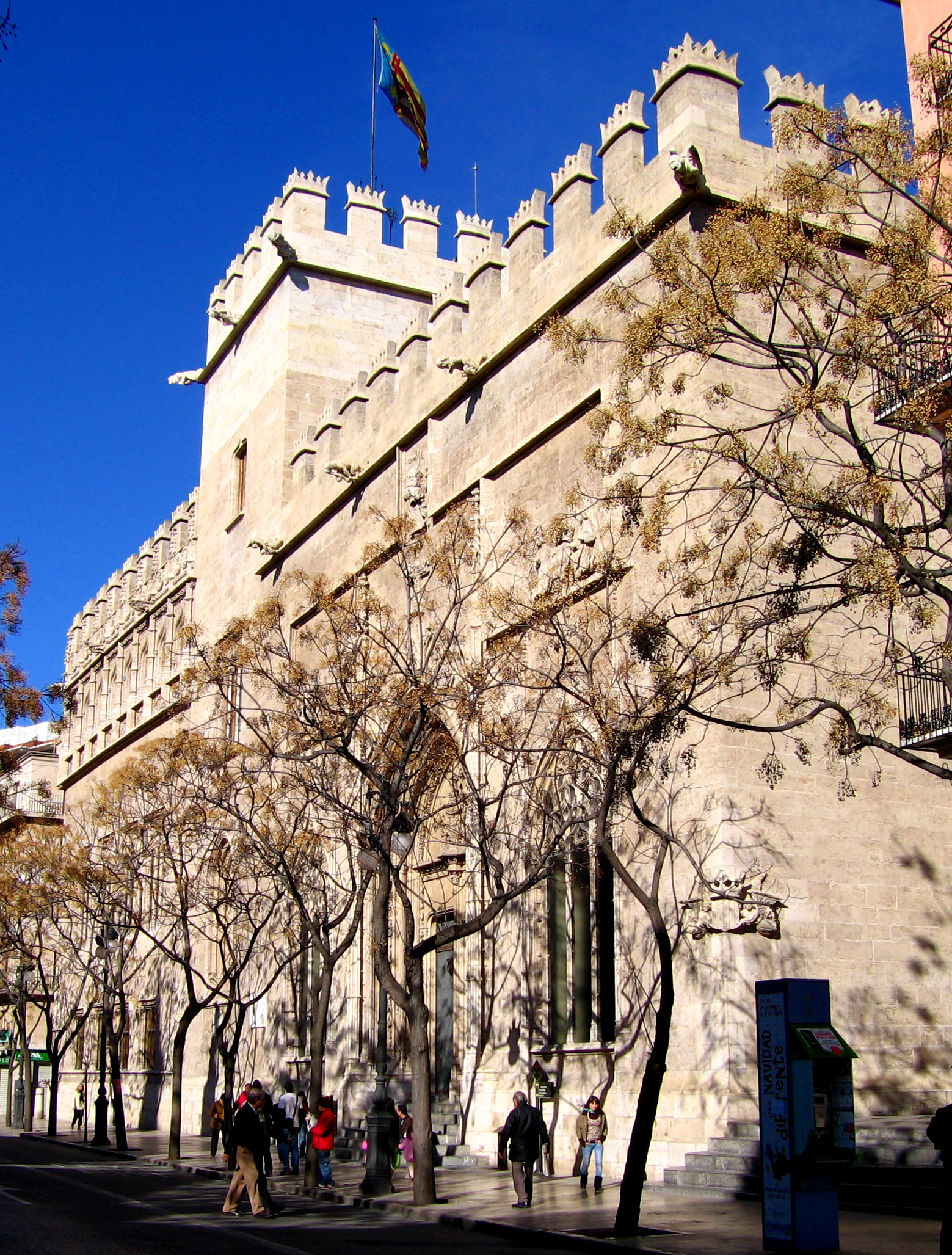 Llotja de la Seda (València)